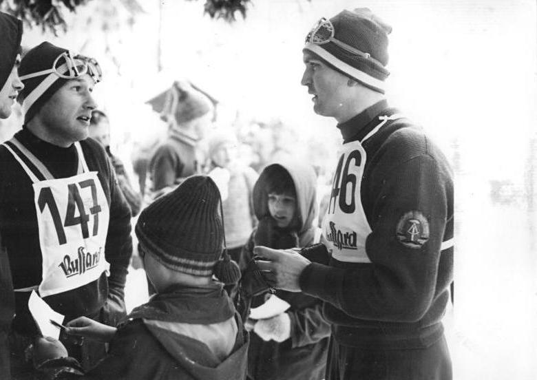 Zentralbild ADN 21.2.1963 Deutsche Skimeisterschaften 1963 - Kombinationssprunglauf auf der Großen Vogtlandschanze Bei den deutschen Skimeisterschaften 1963 übernahm im Kombinationssprunglauf am 21.2.1963 auf der Großen Vogtlandschanze in Mühlleithen Rainer Dietel mit der offiziellen Note 274,1 und Weiten von 67 und 66 Metern überlegen die Führung. Den zweiten Platz belegte Jürgen Meinel mit der Note 259,4. UBz: Rainer Dietel (rechts) und Günter Meinel (links). (Gahlbeck)